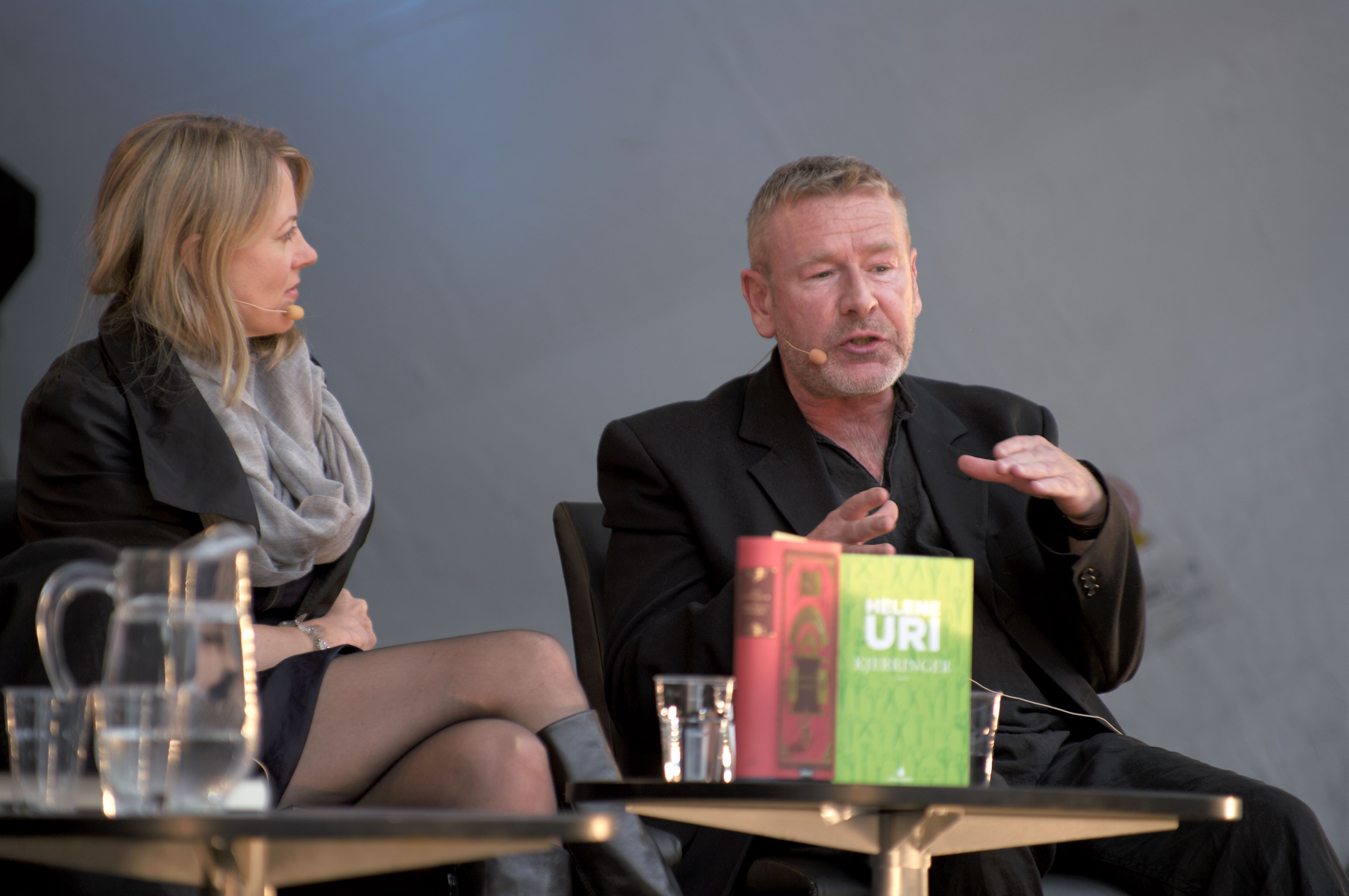 Tomas Espedal at Oslo bokfestival 2011.